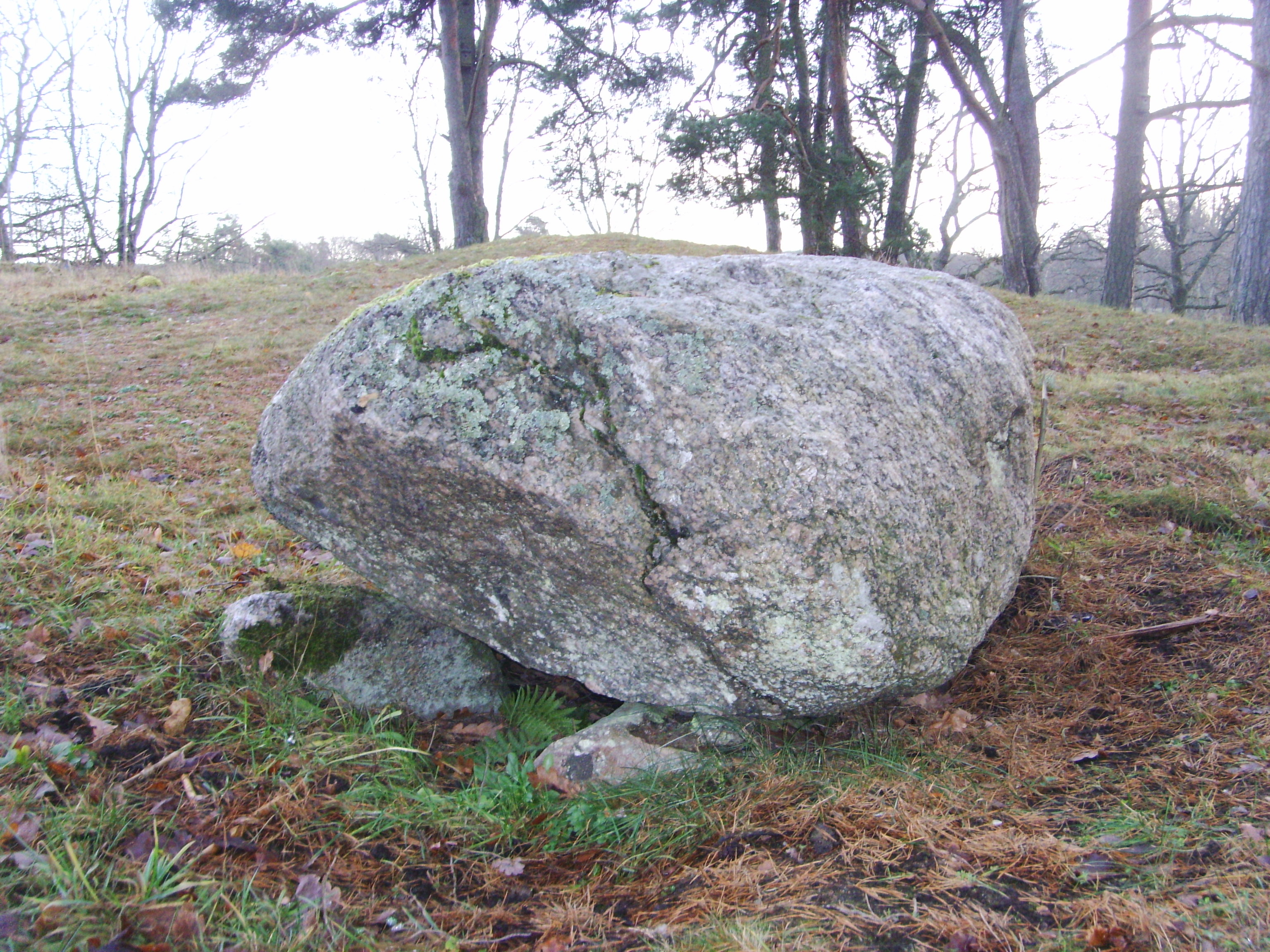 Fornlämning Borg 218:1, ca 500 meter väster om Borgs kyrka, i en hage vid den gamla landsvägen (Eriksgatan), är en offersten, som också med stor sannolikhet har använts såsom klangsten. Stenen är uppallad på tre st 0,4-0,5 m st stenar. N-änden verkar "tvärt" avhuggen. På ovansidan hittas 8 skålgropar. Samtliga av dessa är mer eller mindre ojämna och kantiga, dock är den största på södra ändan 7 cm i diam och 1 cm dj. Traditionen säger att "Vid offerstenen nära Borgs kyrka skola tre kungar eller krigare ha spisat frukost en gång och använt stenen som bord".